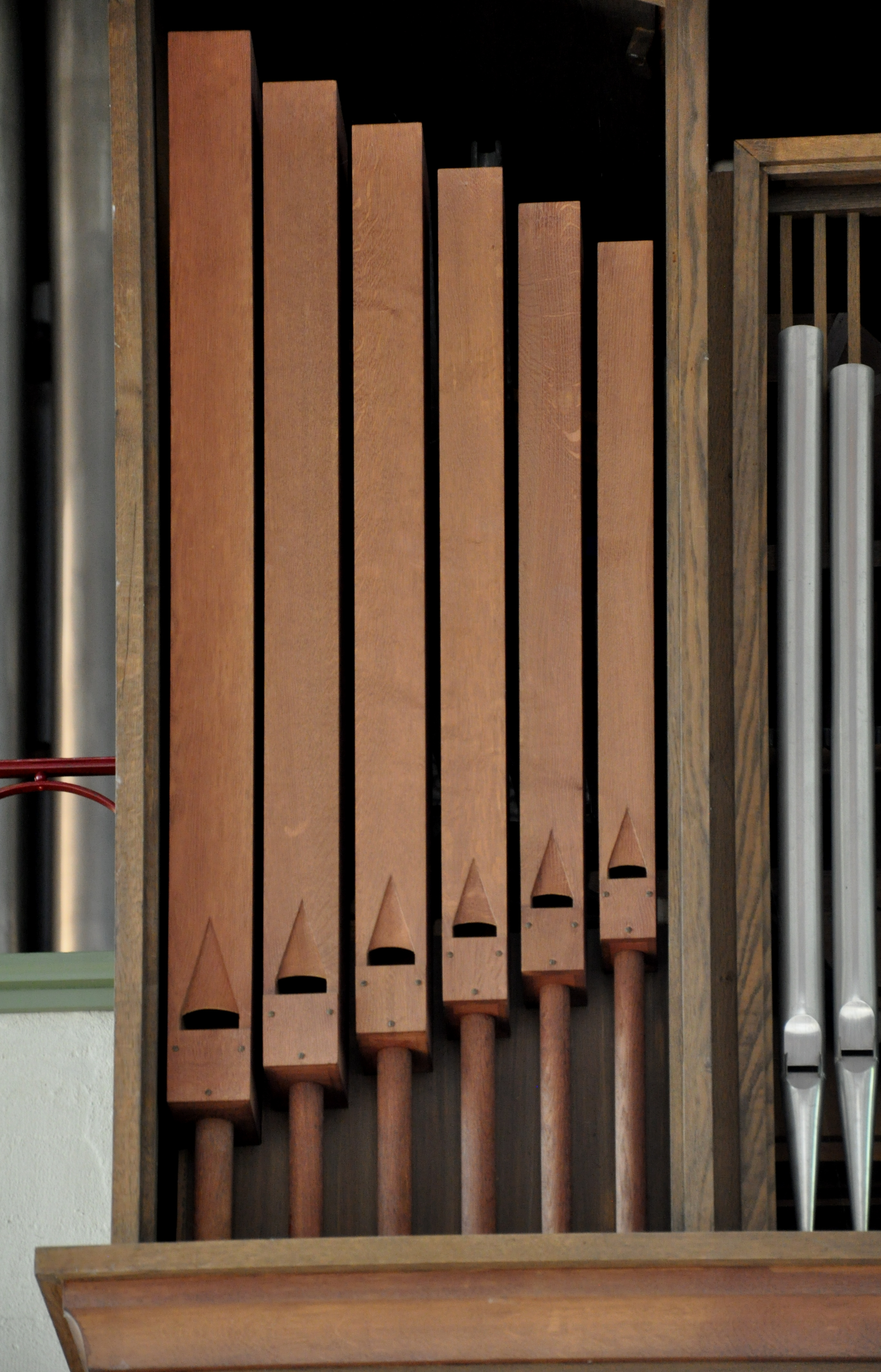 Stuttgart, Ev. Christuskirche (Stuttgart-Ost, Gänsheidestraße), Orgel, Detail vom Prospekt mit Holzpfeifen